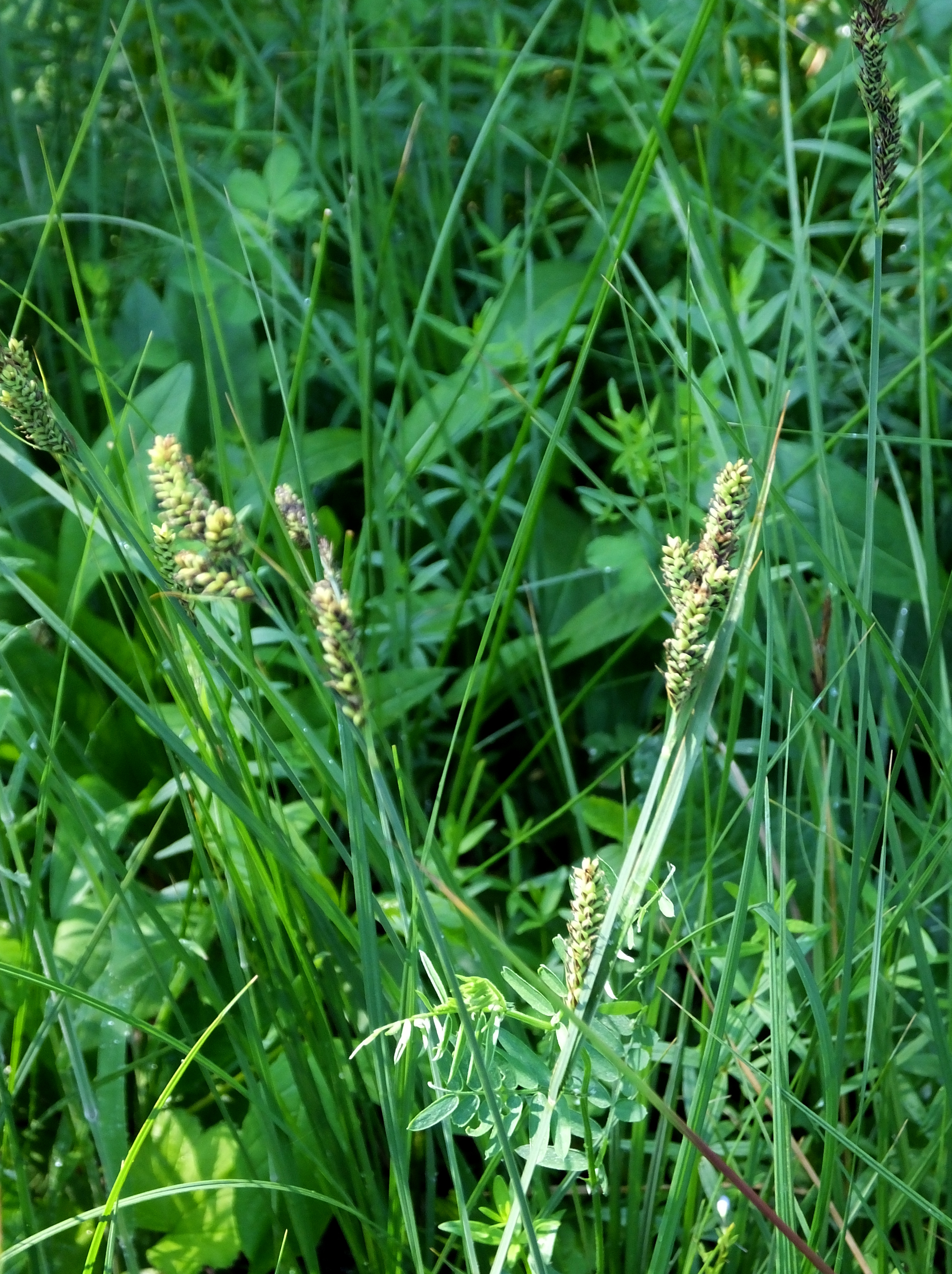 Turzyca Hartmana na Kalinowej Łące.